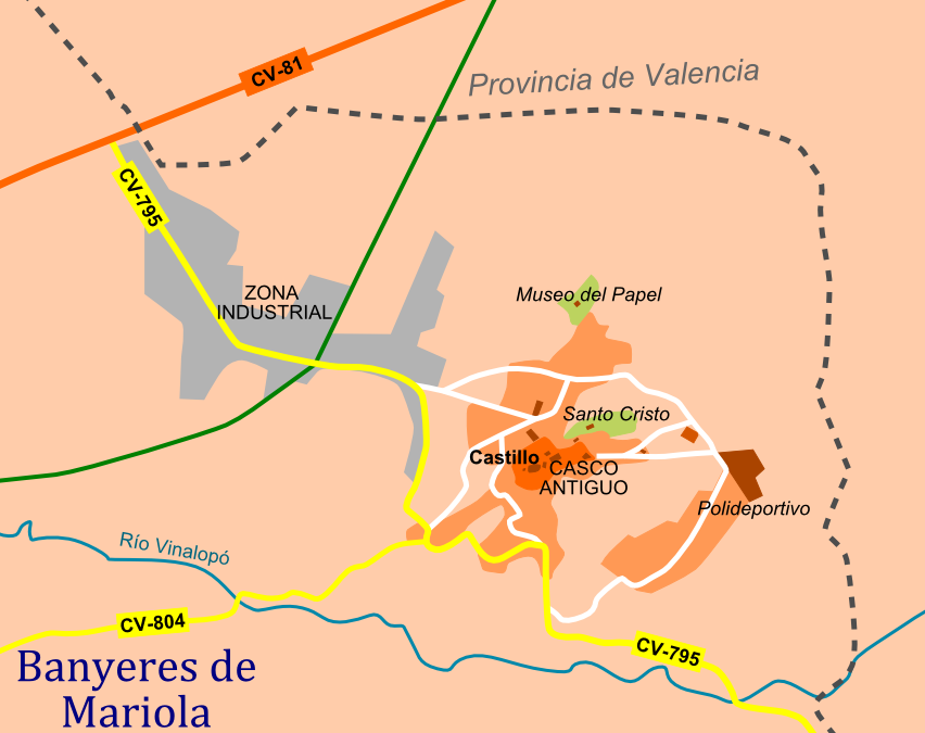 Accesos de Bañeres